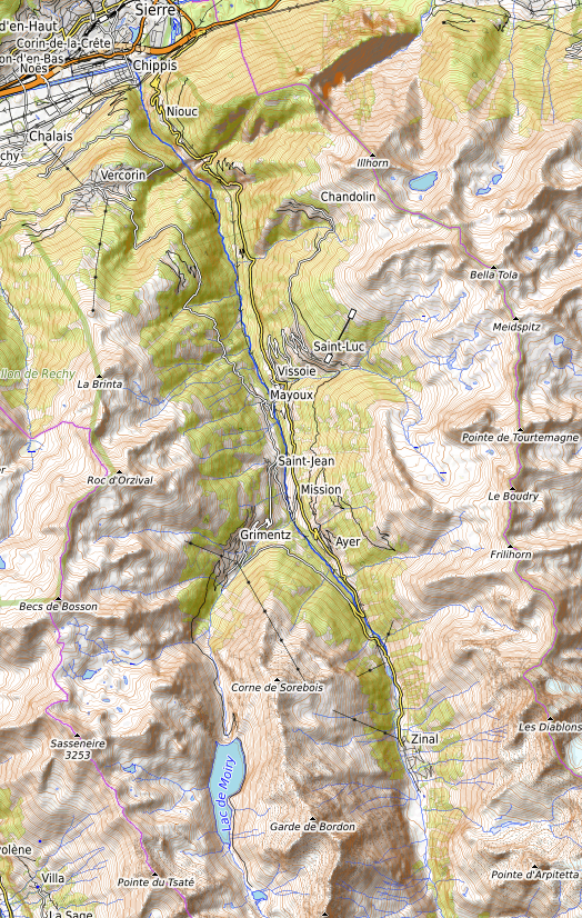 Carte réalisée sur umap This map may be incomplete, and may contain errors. Don't rely solely on it for navigation.